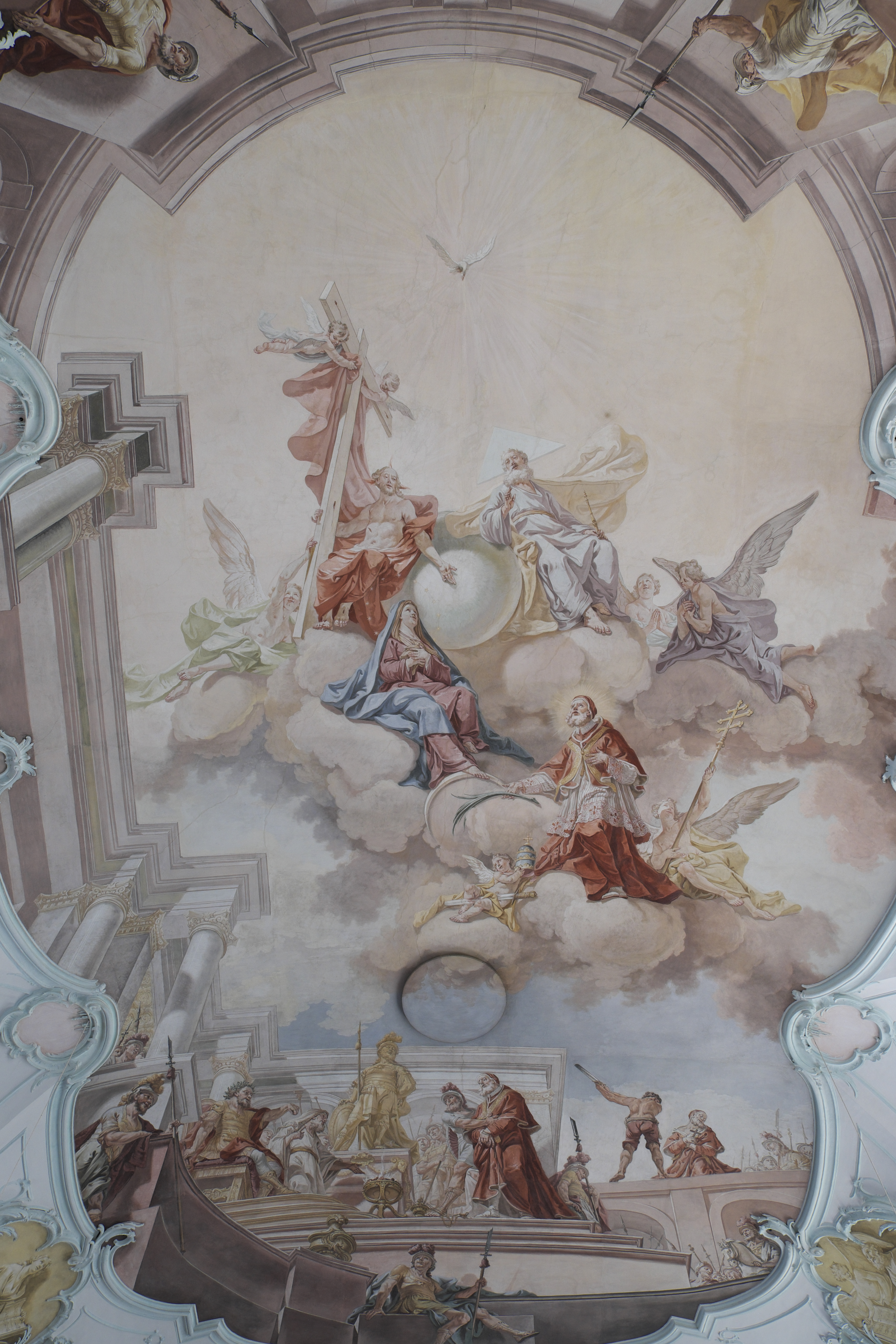 Katholische Pfarrkirche St. Sixtus in Moorenweis im Landkreis Fürstenfeldbruck (Bayern/Deutschland), Fresko von Matthäus Günther im Langhaus, von 1775; Darstellung: Martyrium und Verherrlichung von Sixtus II.